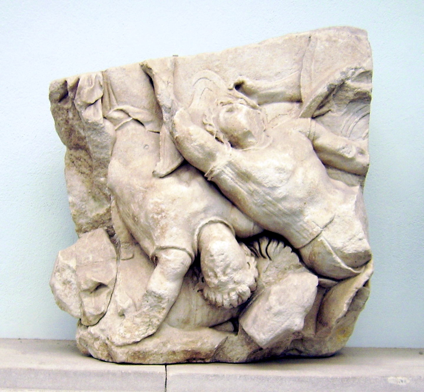 Platte 25: Ajax tötet Heloros und Aktaios. Ajax tötet Heloros und Aktaios, Telephosfries.